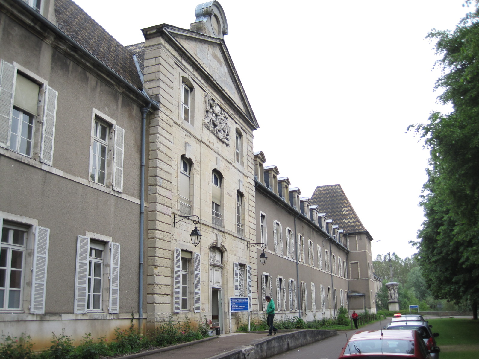 Hospices de Dijon